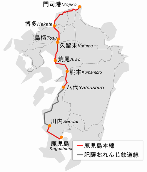 Map of Kagoshima Main Line , Kyushu Japan.